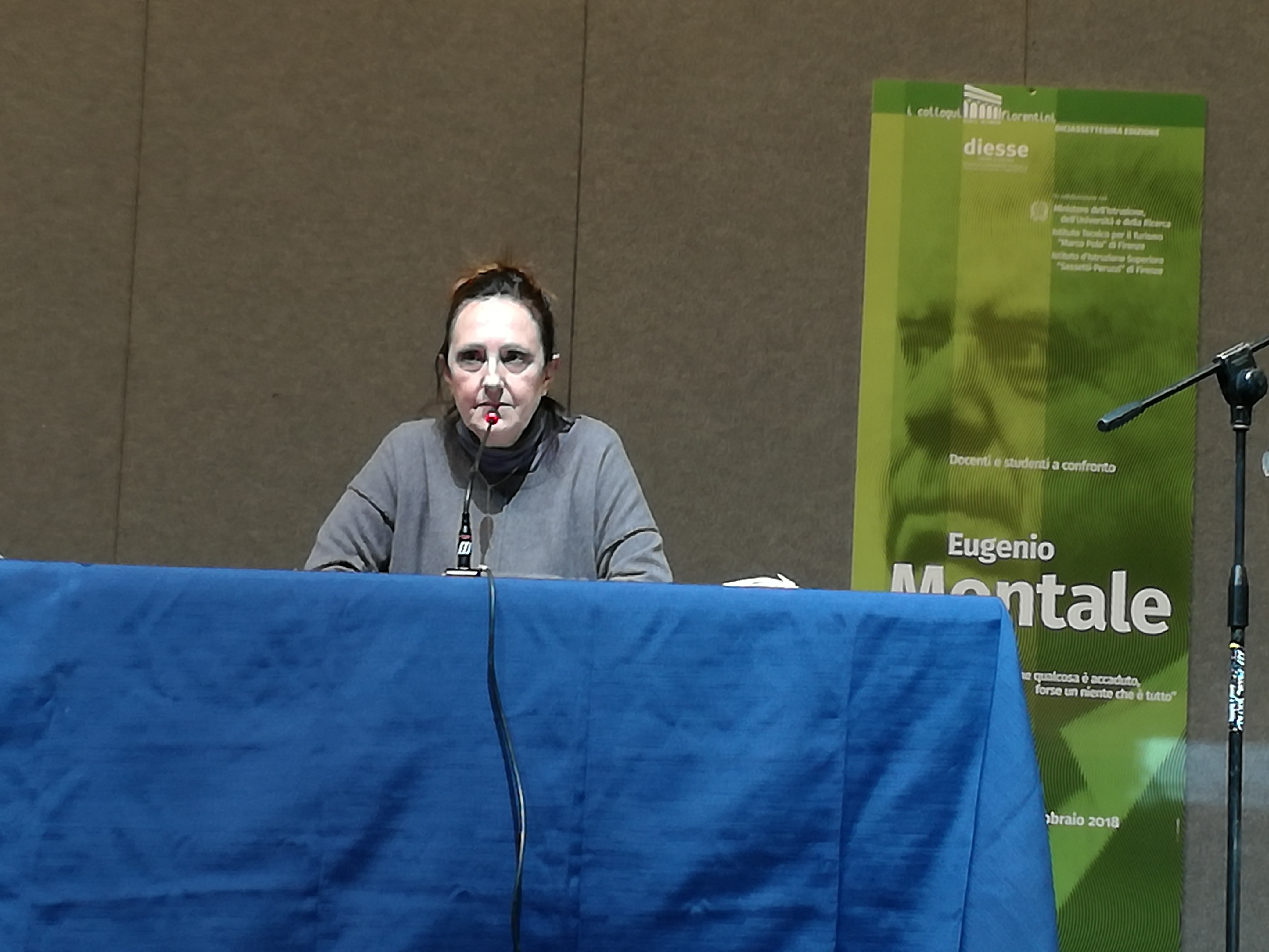 Alba Donati parla del Gabinetto Viesseux ai Colloqui Fiorentini 2018